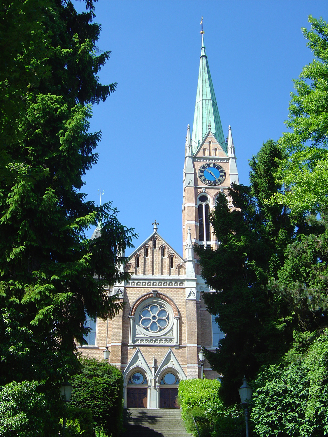 ref. Kirche Bühl in Zürich-Wiedikon, erbaut nach Plänen Paul Rebers, eingeweiht am 29. November 1896